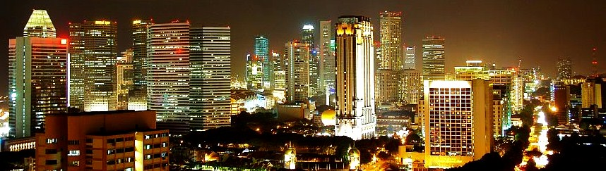 Skyline del CF (San Isidro) de Lima